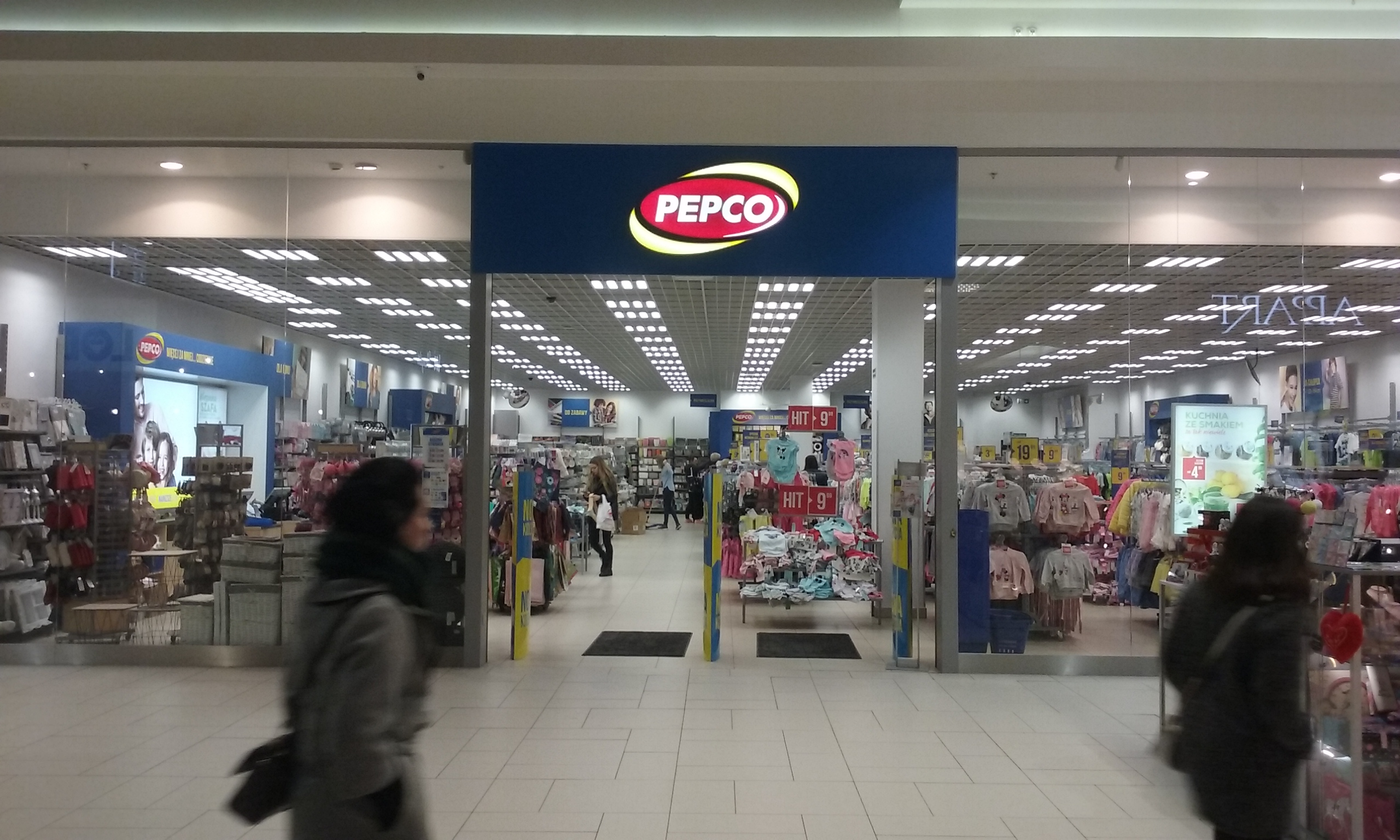 Salon Pepco w 60-tysięcznym Tomaszowie Mazowieckim w województwie łódzkim